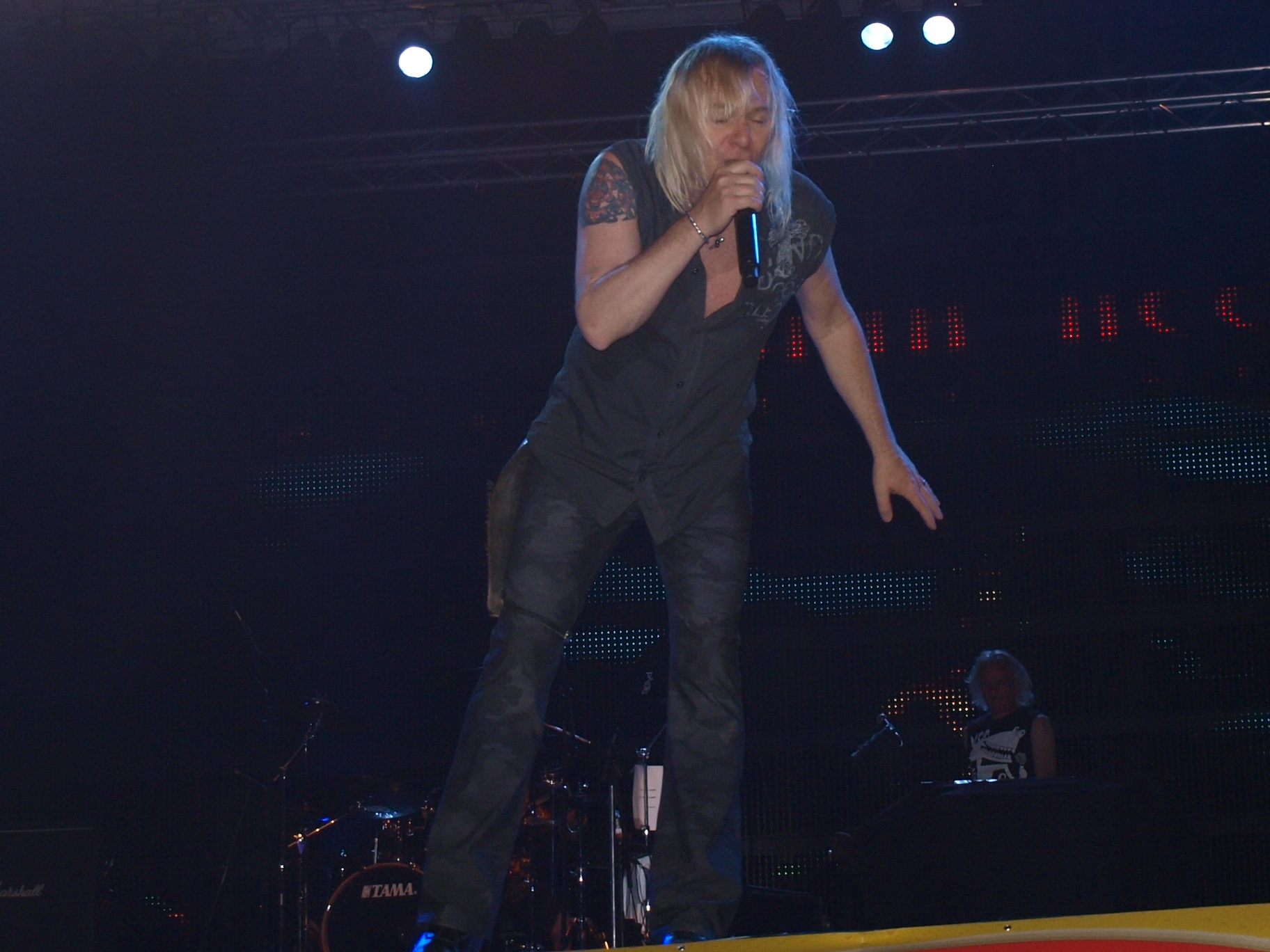 Uriah Heep na Mega Bikers susretima u Slavonskom Brodu, 9. svibnja 2009. godine.